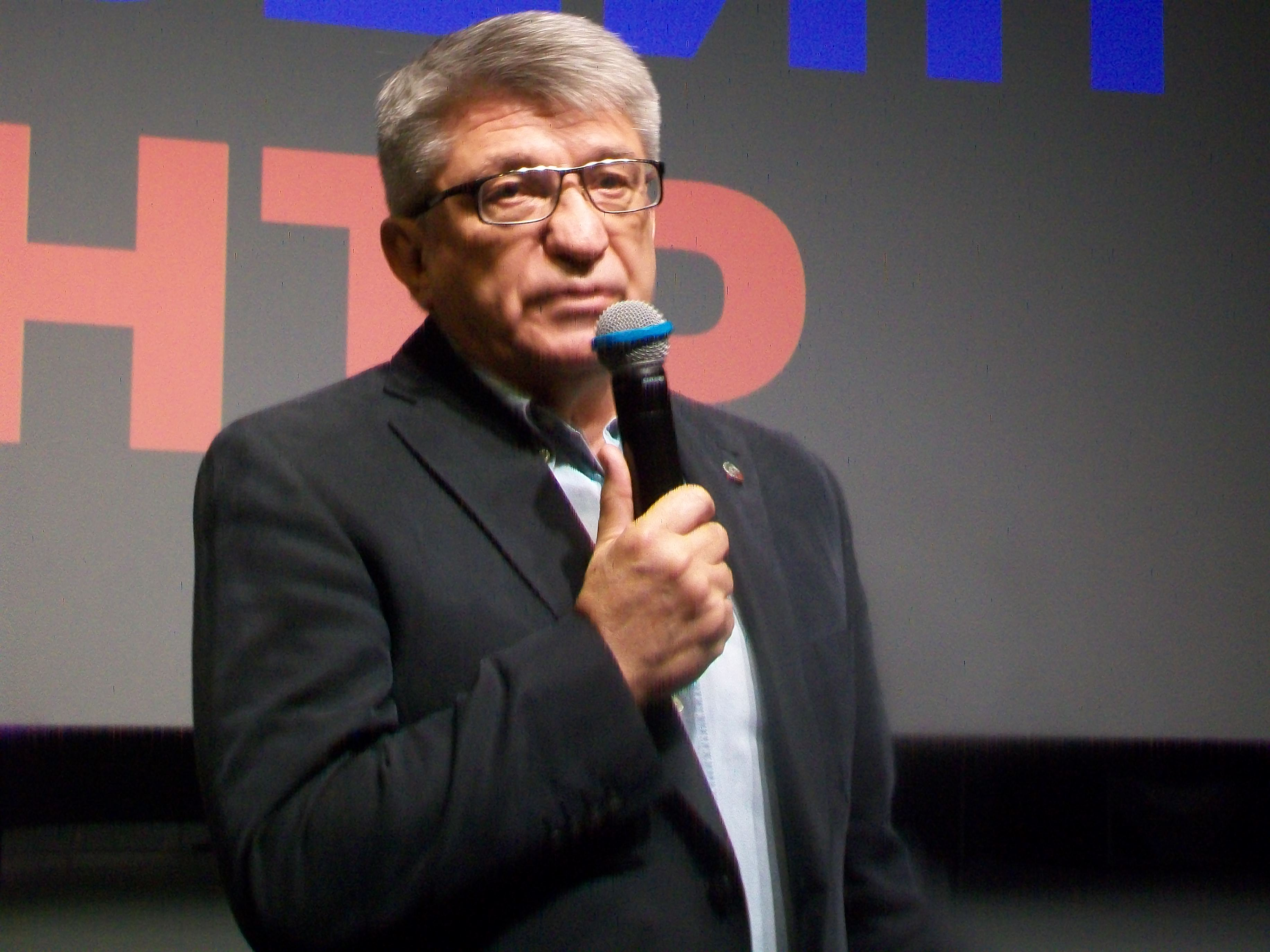 Александр Николаевич Сокуров в Ельцин-центре, 3 сентября 2017 года